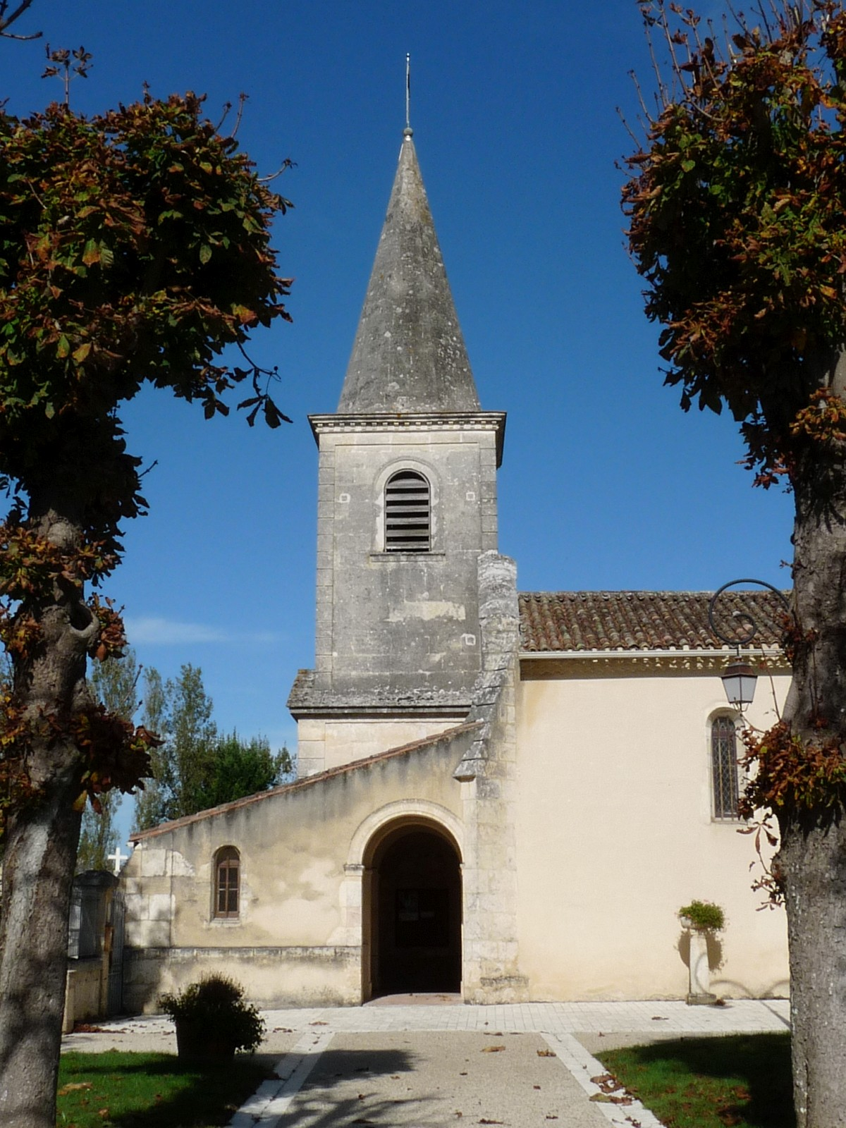 Eglise de Civrac-de-Blaye, Gironde, France